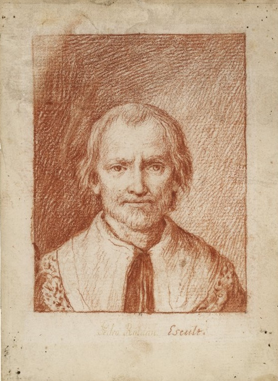 El escultor Pedro Roldán. Dibujo de Francisco de Goya. 23x17 cm. Estuvo en las colecciones de Juan Agustín Ceán Bermúdez (1749-1829), Félix Boix (1858–1932) y Enriqueta de Fránkfort (1910-2006). Fue adquirido por el Museo Británico en 2007.